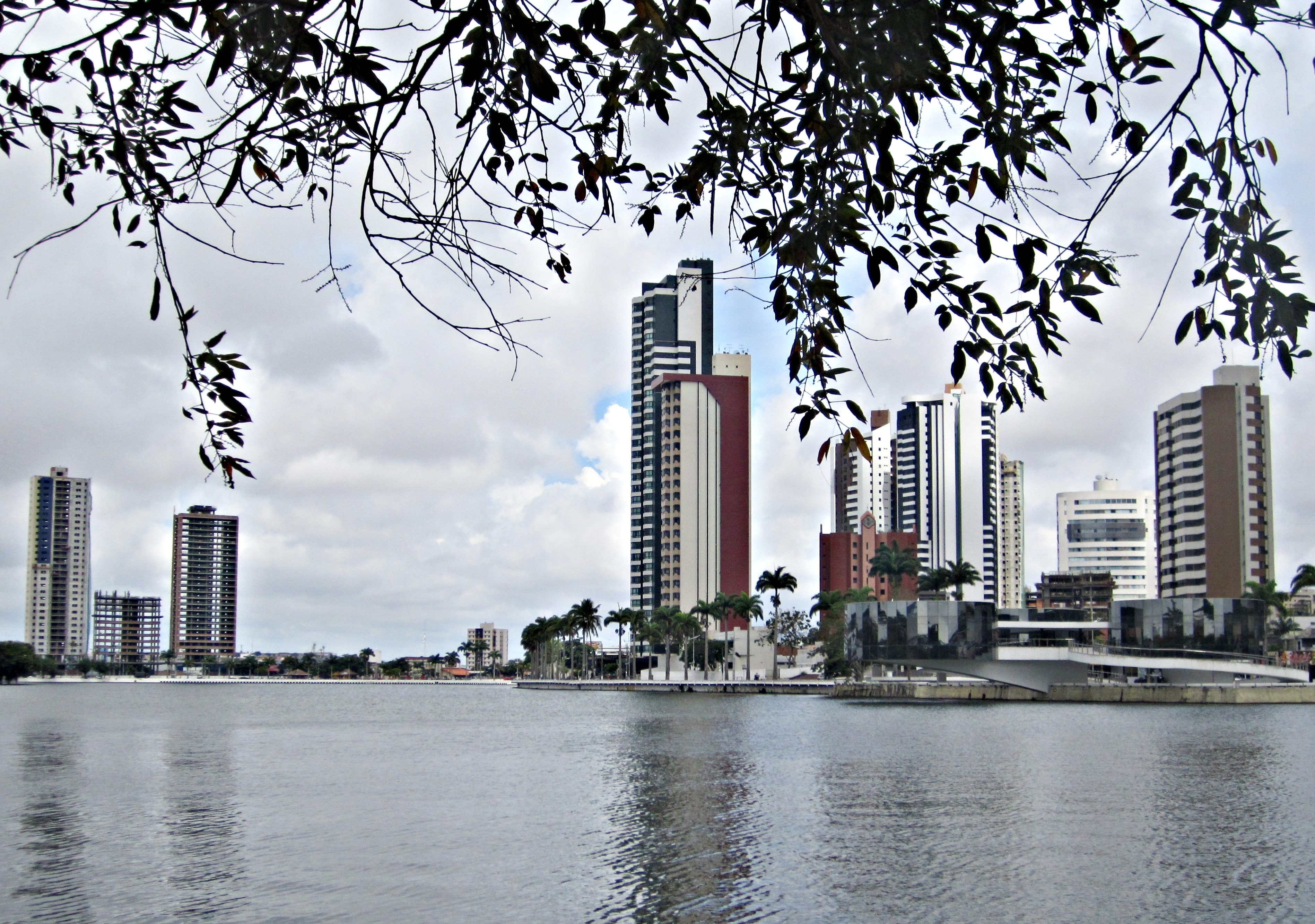 Açude Velho - Campina Grande, Paraíba, Brasil